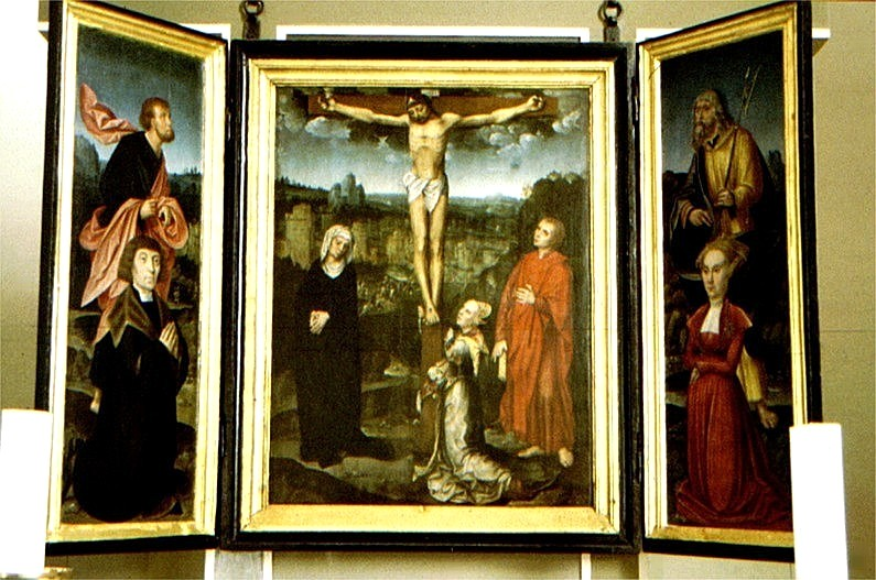 Nødebo Kirke i Danmark. Altertavle